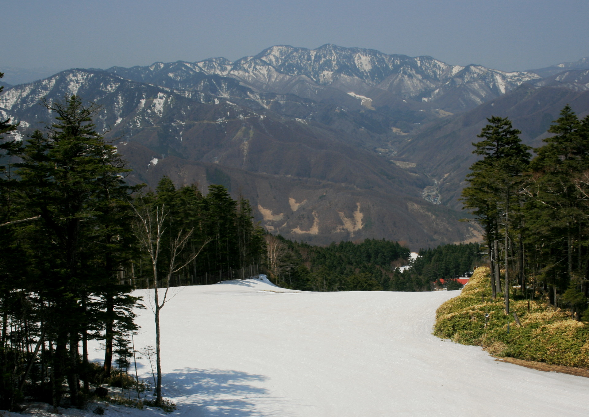 野麦峠スキー場から望む鎌ヶ峰